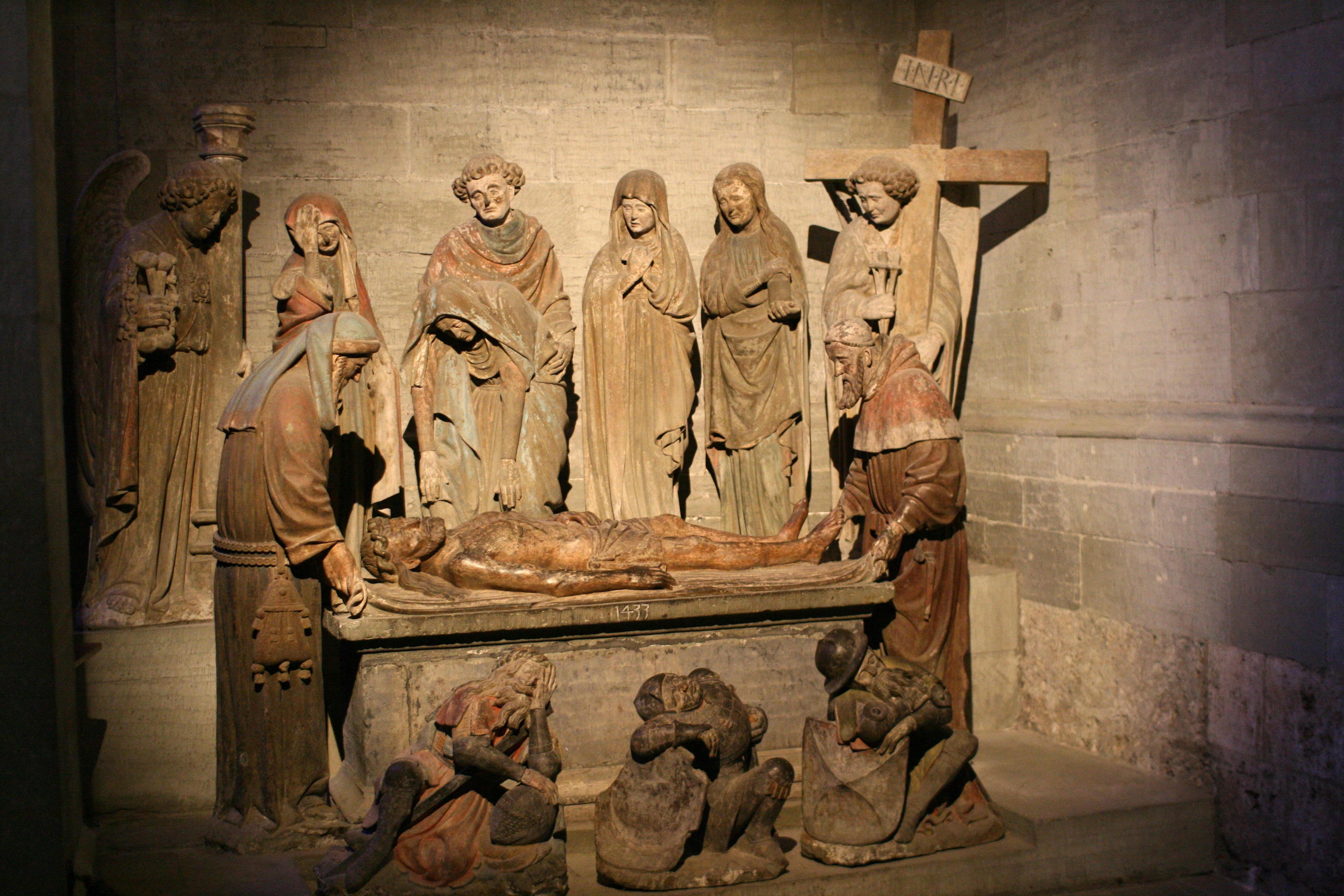 Heiliggrabkapelle-St. Niklaus Kathedrale Fribourg